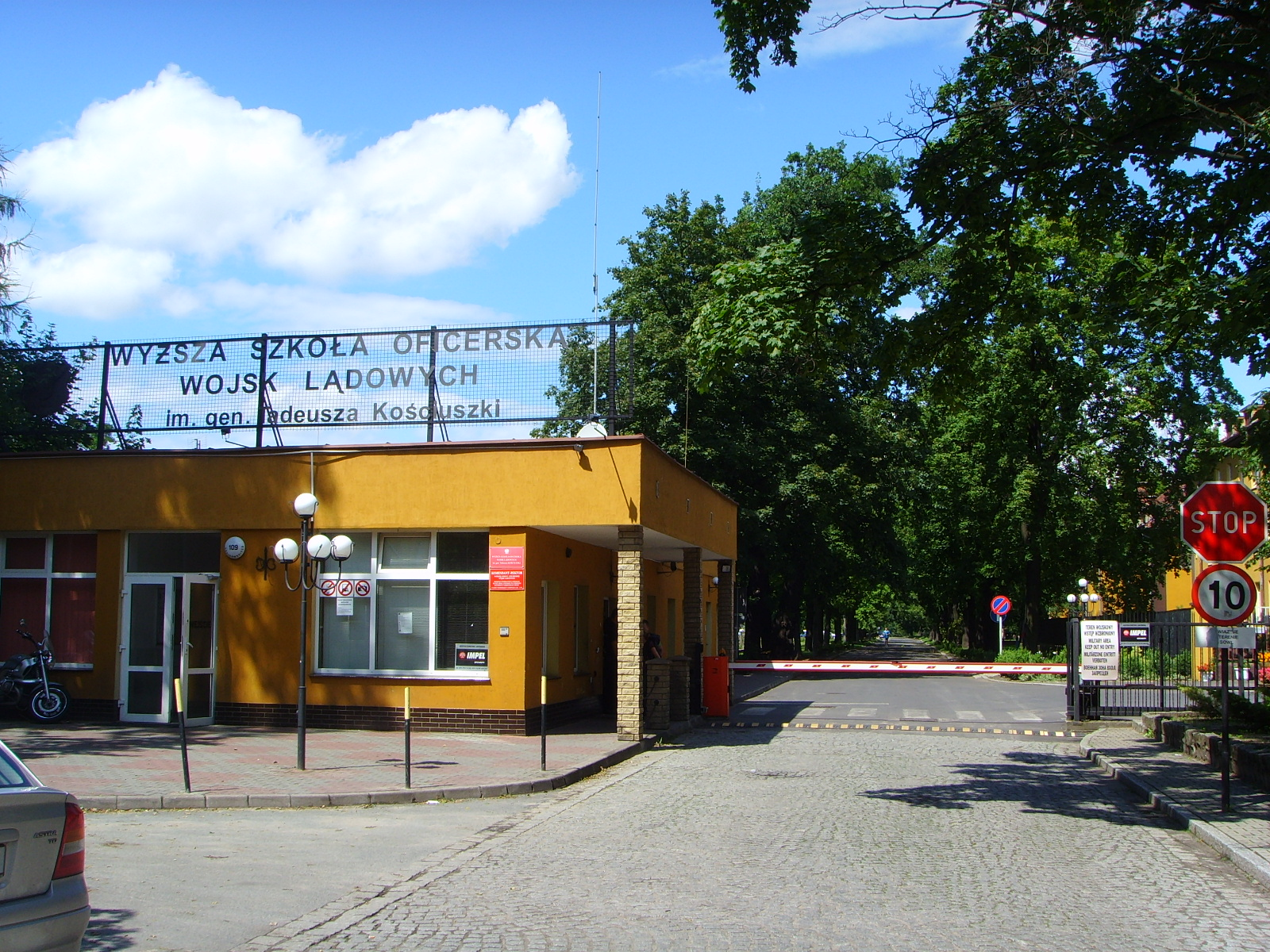 WSO we Wrocławiu